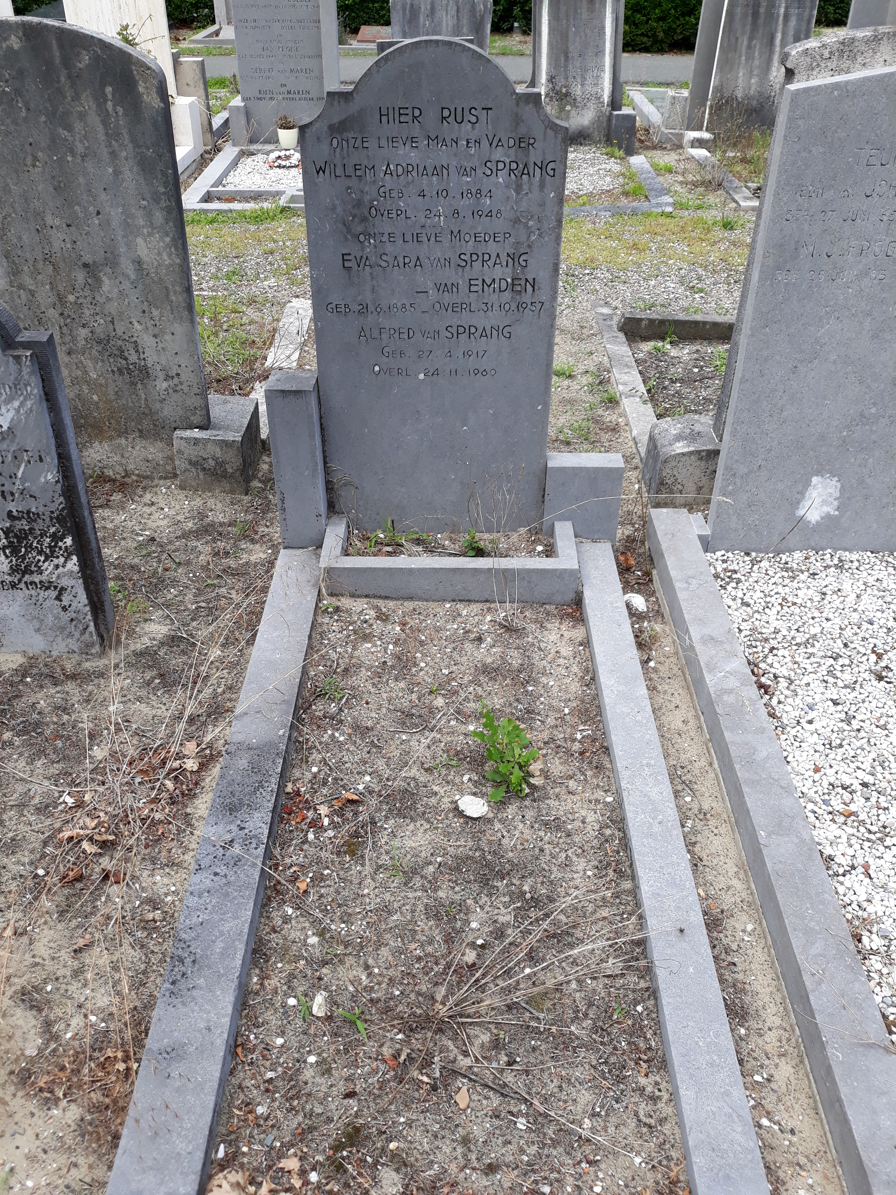 Das Grab des niederländischen Journalisten Alfed van Sprang im Grab seiner Eltern auf dem Friedhof Oud Eik en Duinen in Den Haag.